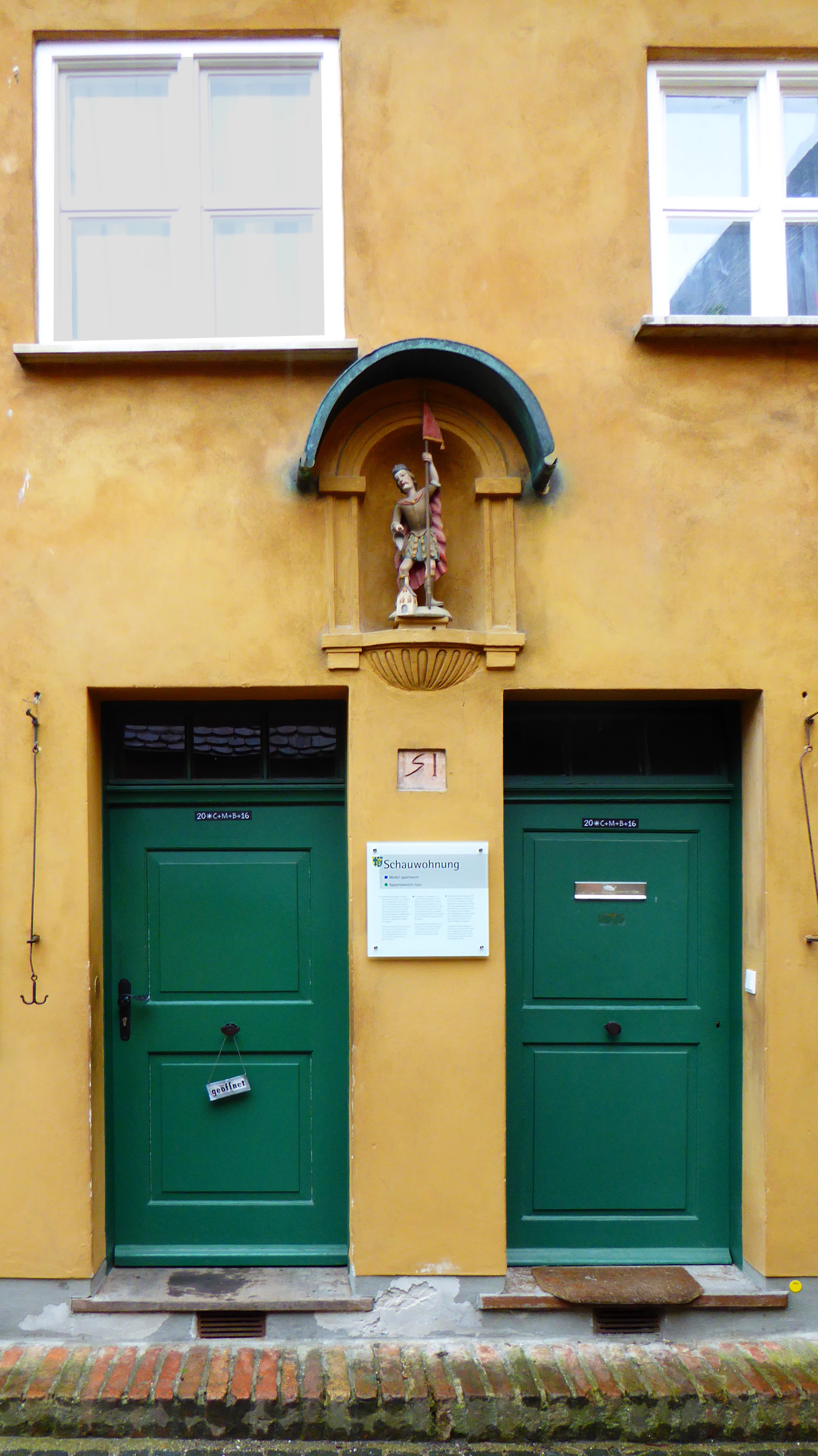 Augsburg, Fuggerei .- Maison du maçon Franz Mozart, arrière-grand-père de Wolfgang Amadeus Mozart.